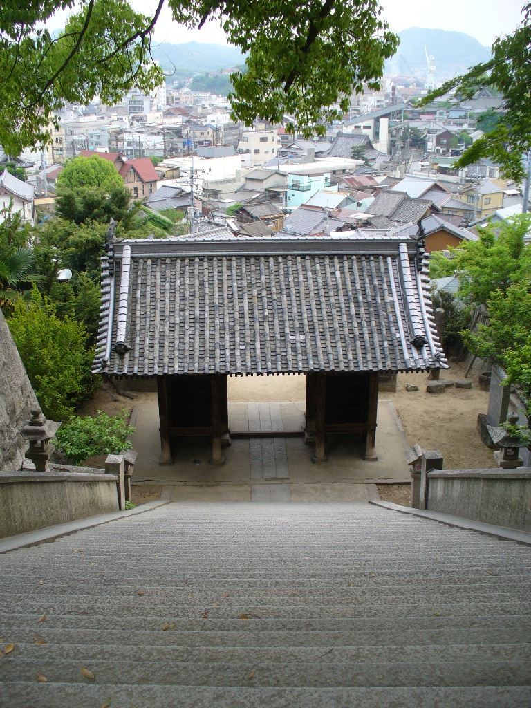 御袖天満宮（尾道市）階段。映画「転校生」ロケ地。